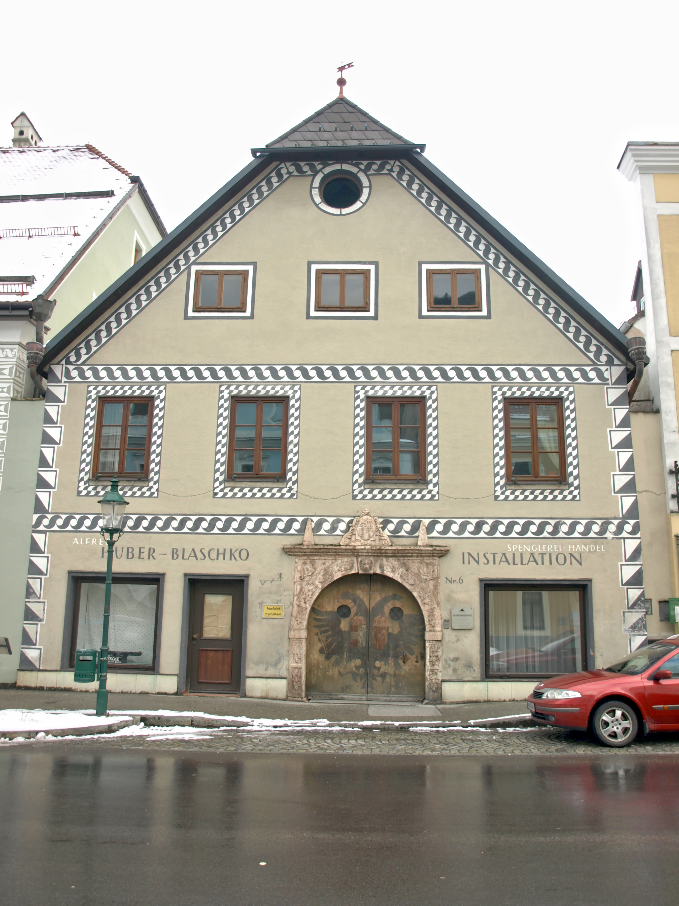 Preuenhueberhaus, Bischöfliches Amtshaus